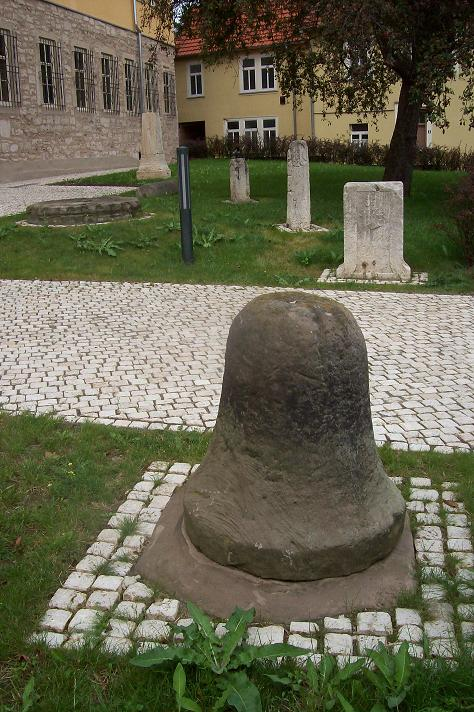 Preußischer Viertelmeilenstein am Museum Bad Langensalza